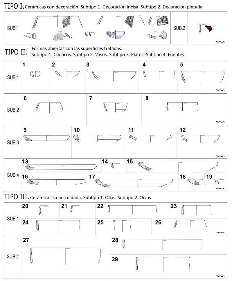 Tipología de los recipientes cerámicos del poblado calcolítico “Venta del Rapa” (Mancha Real, Jaén) 1. Cuenco o vasito pequeño de paredes gruesas. 2. Cuenco plano de casquete esférico. 3. Cuenco grande de casquete esférico. 4. Cuenco de casquete semiesférico. 5. Cuenco grande de casquete semiesférico. 6. Vaso de carena media. 7. Vaso de carena baja. 8. Vaso de Perfil en “S”. 9. Plato de perfil sencillo. 10. Plato de borde engrosado indicado en ambas caras. 11. Plato de borde engrosado indicado en la cara externa. 12. Plato de borde engrosado indicado en la cara interna. 13. Fuente no carenada de borde simple. 14. Fuente de borde engrosado y labio plano. 15. Fuente no carenada de borde engrosado indicado en ambas caras. 16. Fuente no carenada y borde engrosado en la cara interna. 17. Fuente no carenada y borde engrosado en la cara externa. 18. Fuente plana con borde engrosado y saliente. 19. Fuente plana con borde indicado en la cara externa. 20. Olla o cuenco de borde ligeramente entrante. 21. Olla con borde marcadamente entrante. 22. Olla con borde vertical ligeramente vuelto hacia el exterior. 24. Olla con borde saliente. 25. Vaso con gollete. 26. Ollita de borde saliente y cuello marcado. 27. Orza de borde ligeramente entrante. 28. Orza de borde saliente. 29. Orza con borde ligeramente vuelto al exterior.